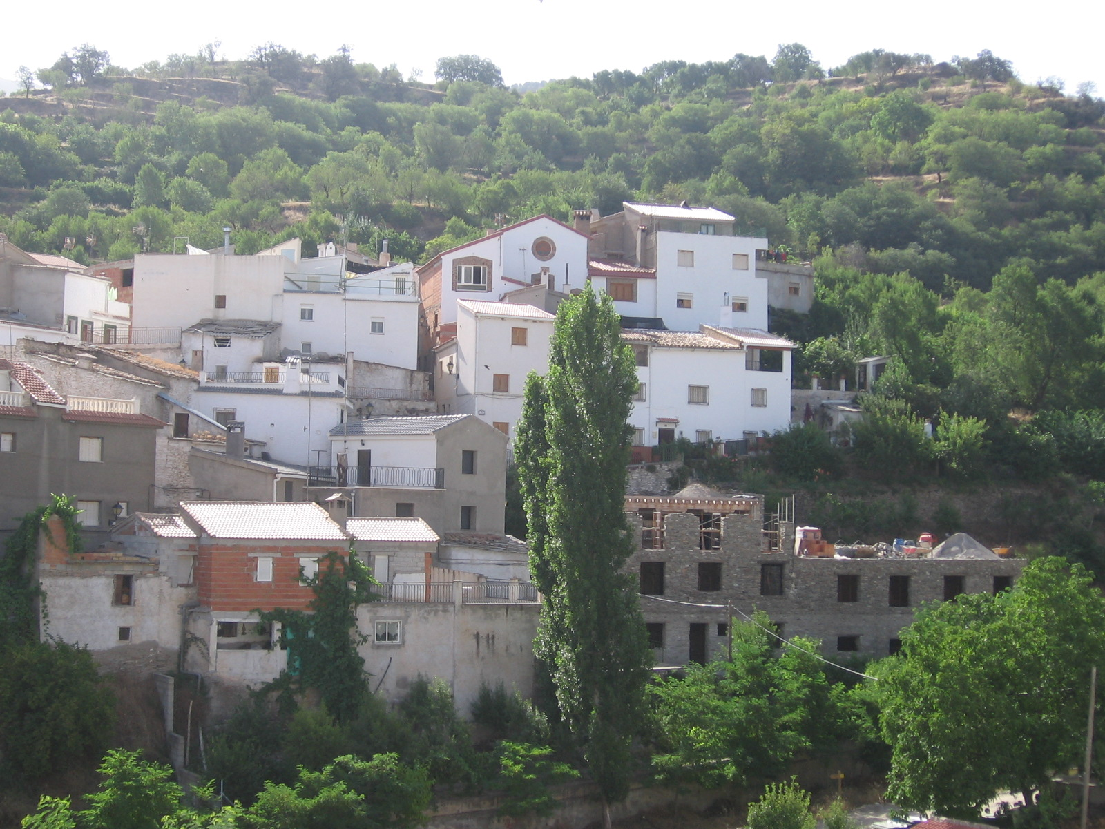 Vista panorámica de Bacares, España.